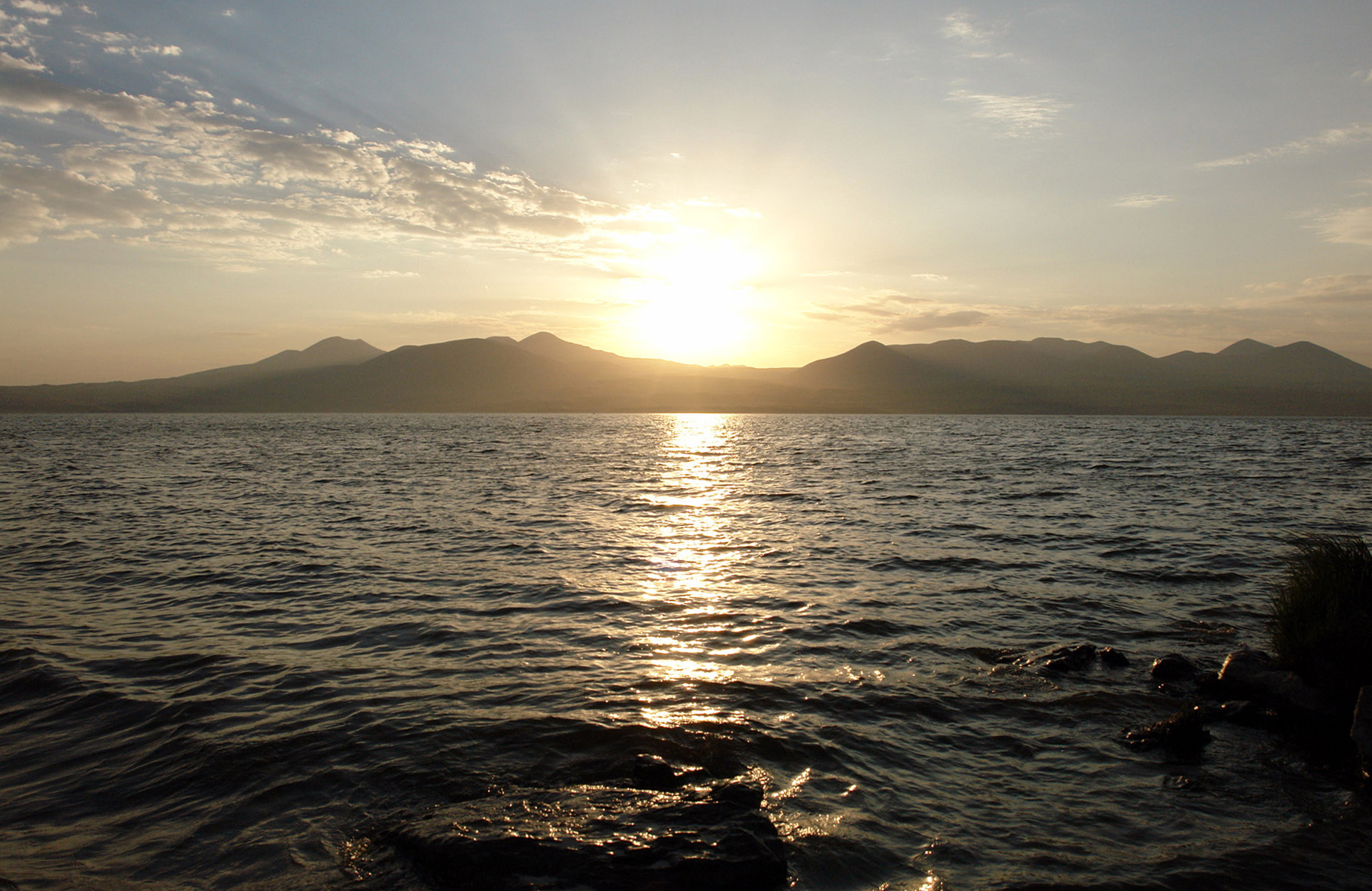 Paravani lake in Georgia